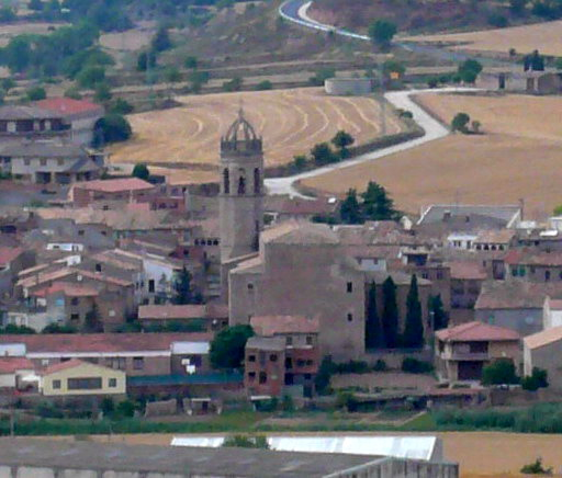 Església parroquial de Santa Maria (els Prats de Rei) des de la torre de la Manresana Object location41° 42′ 18.58″ N, 1° 32′ 31.93″ E